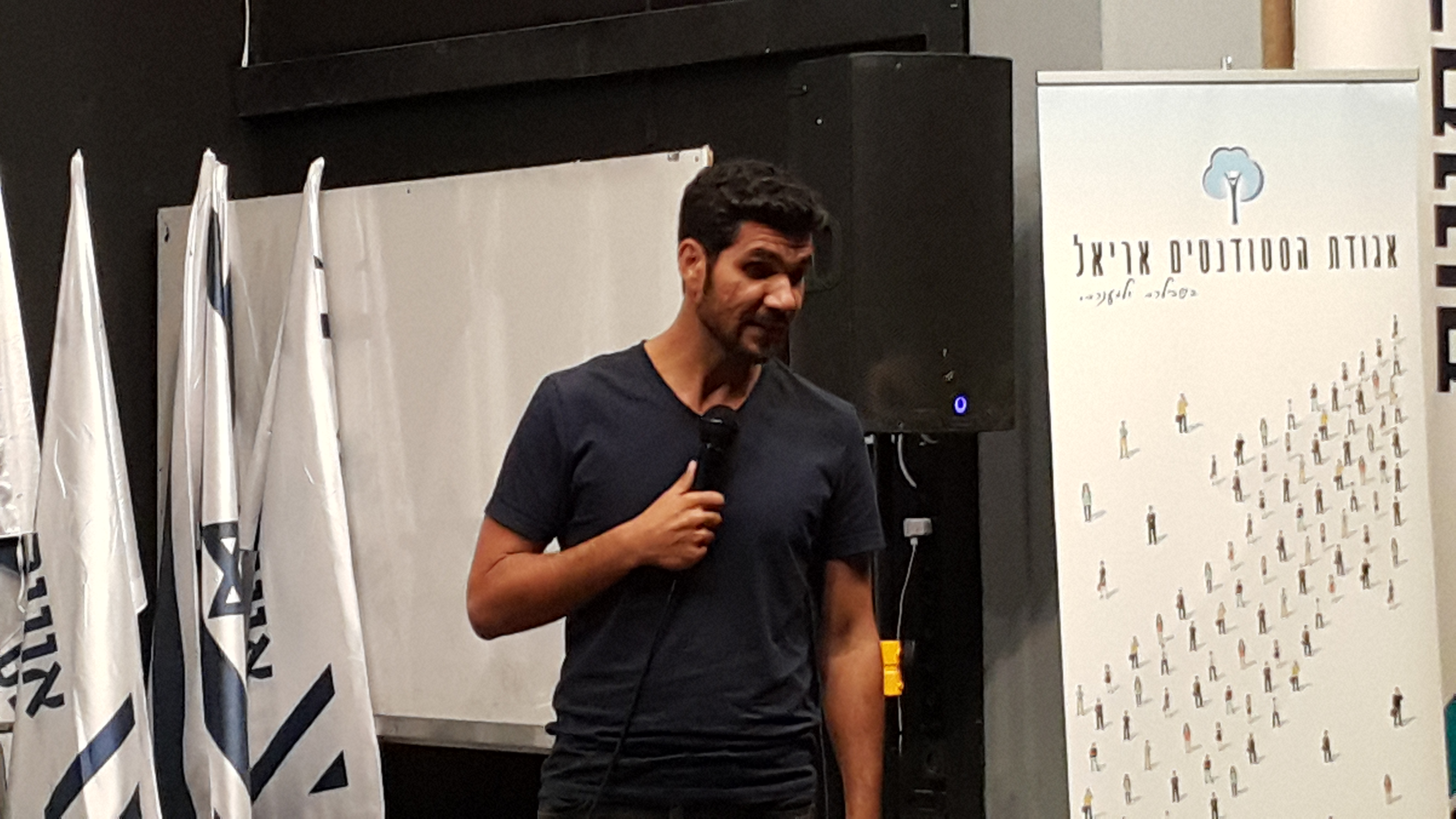 שלמה קוריאט